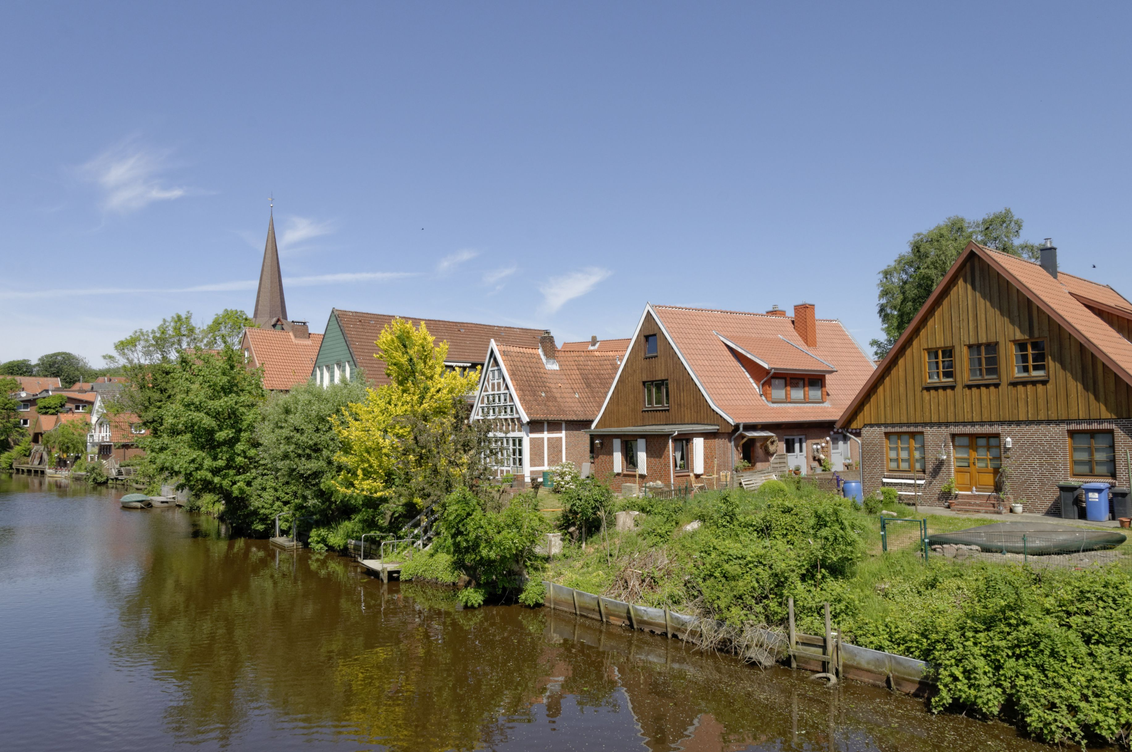 Otterndorf, an der Medem